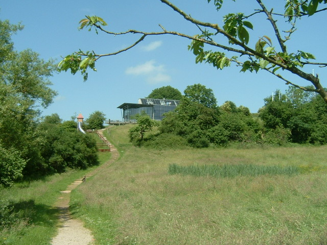 Gaytalpark in Obersgegen, ein Ortsteil von Körperich in der Eifel (Informations- und Ausstellungshalle)